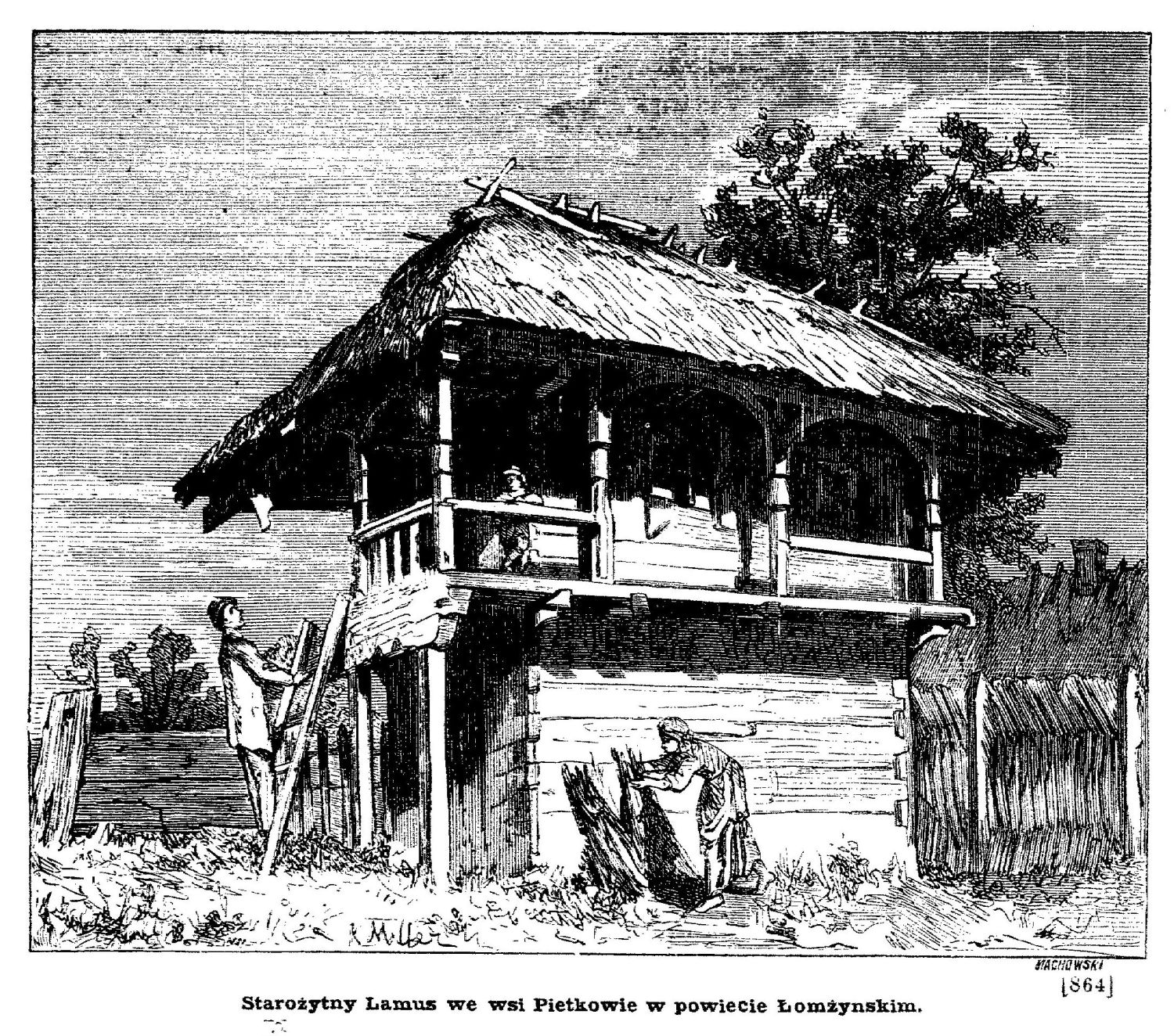 Lamus w Pietkowie - drzeworyt sztorcowy